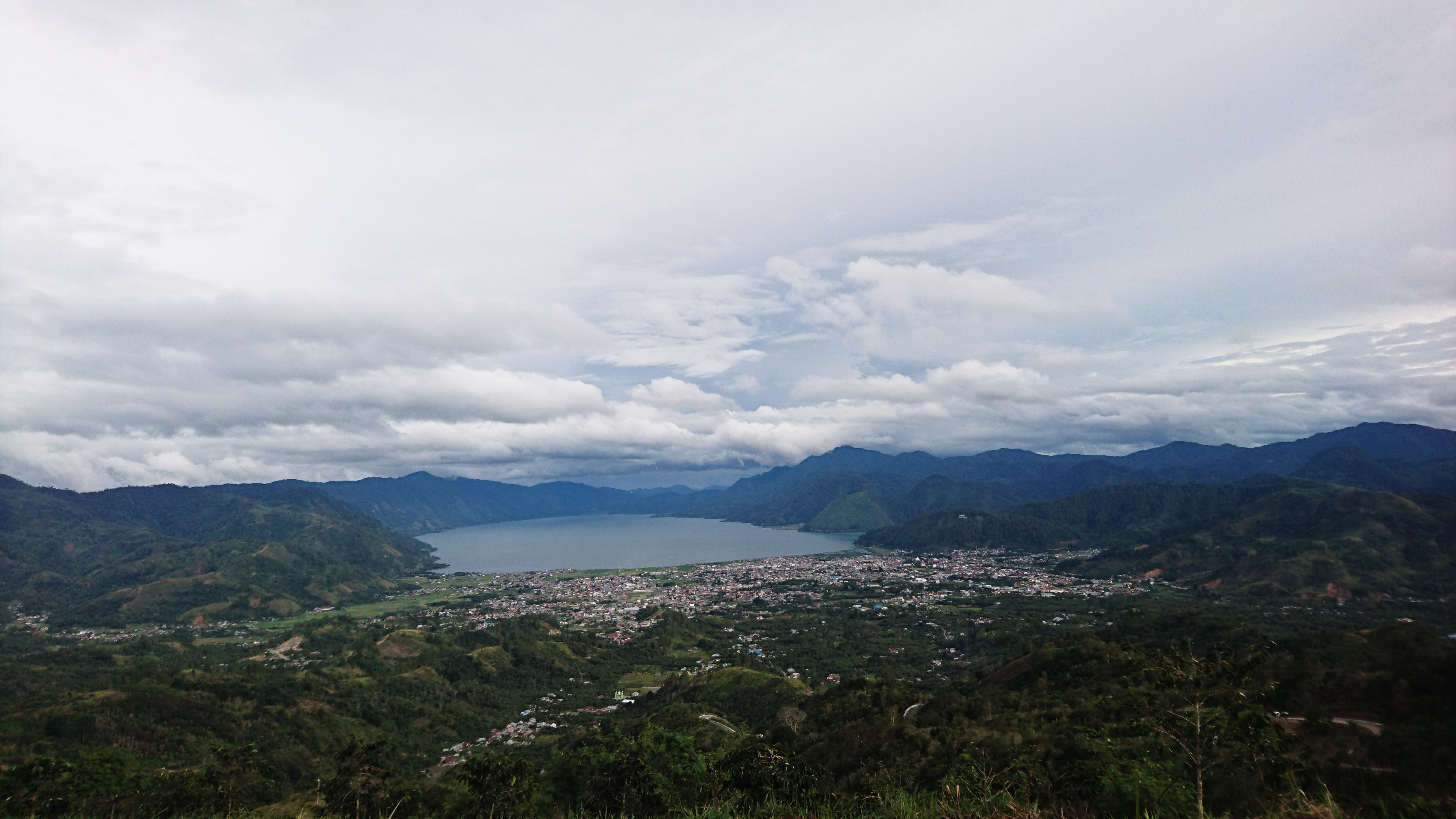 Takengon merupakan ibukota Kabupaten Aceh Tengah. Foto ini saya abadikan dari objek wisata Pantan Terong. Kota kecil ini berada di ketinggian 1.200 mdpl, donominasi oleh suku Gayo. Danau yang terdapat di kota ini yaitu Danau laut tawar yang merupakan danau terbesar di provinsi Aceh.